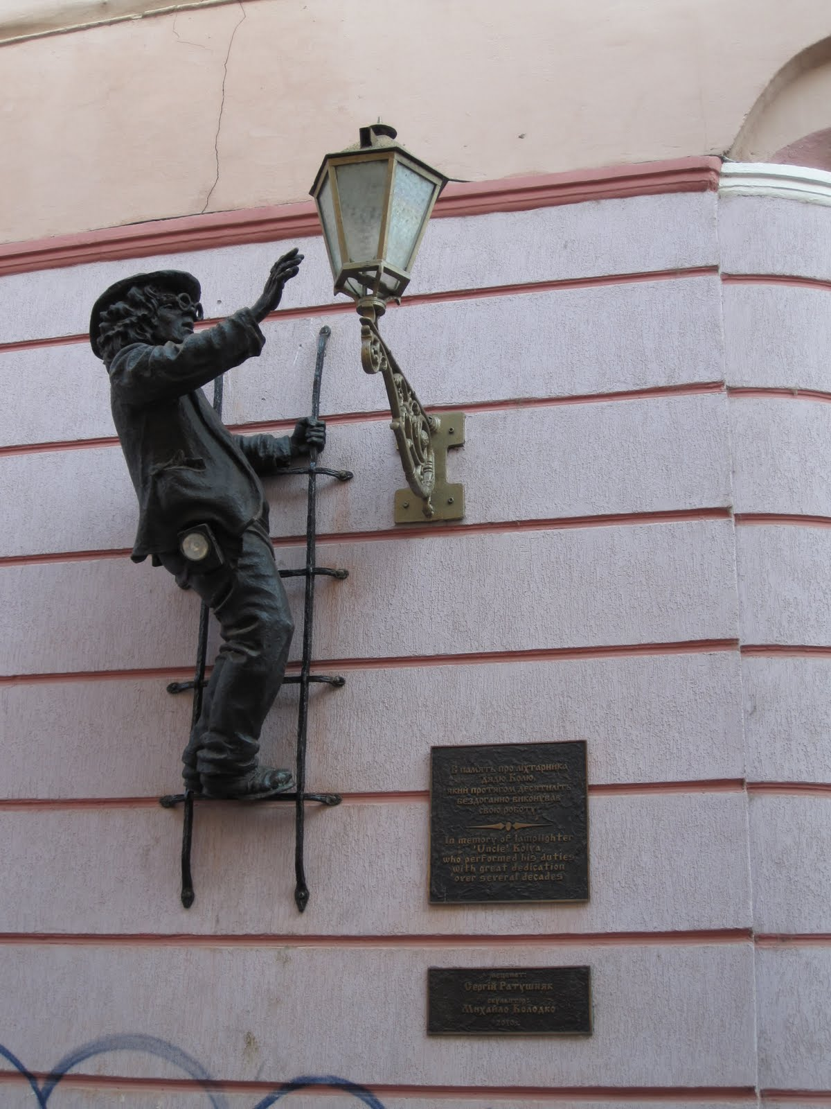 Адреса: ул. Волошина, 7